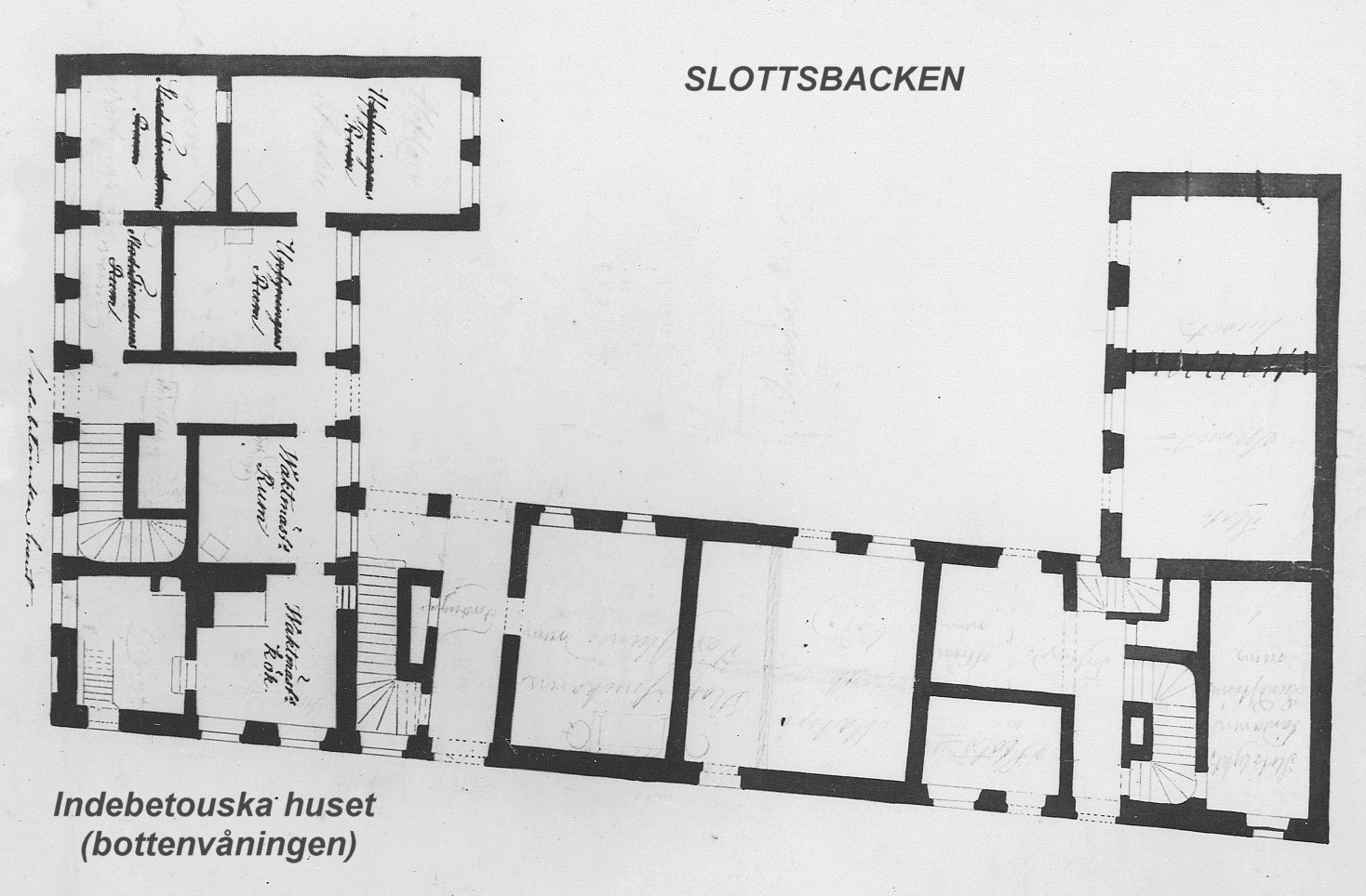 Indebetouska huset planritning, bottenvåning